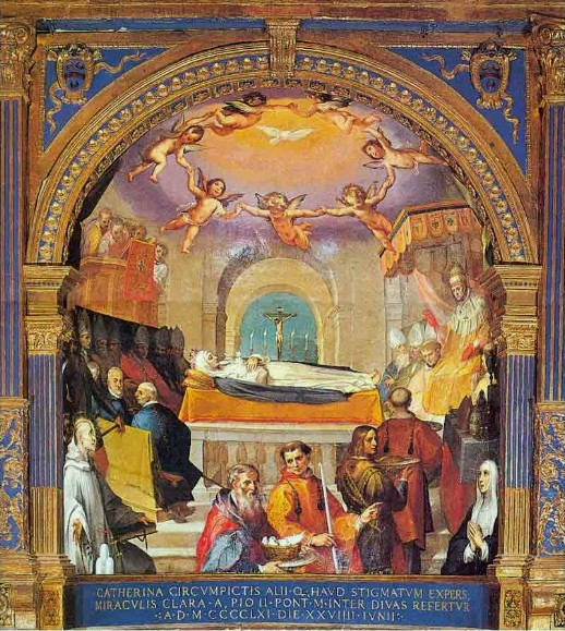 gli sala delle riunuinu dei confradelli della Compagioa di S.Catarina